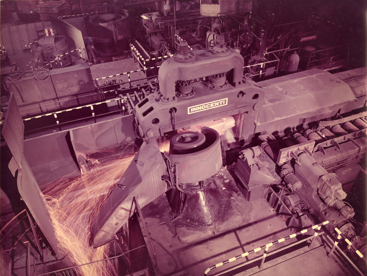 Servizio fotografico : Italia, 1960 / Paolo Monti. - Stampe: 14 : Positivo colore, sviluppo cromogeno/ carta, 24x30. - ((Sul coperchio della scatola, manoscritto a pennarello: "Colore"